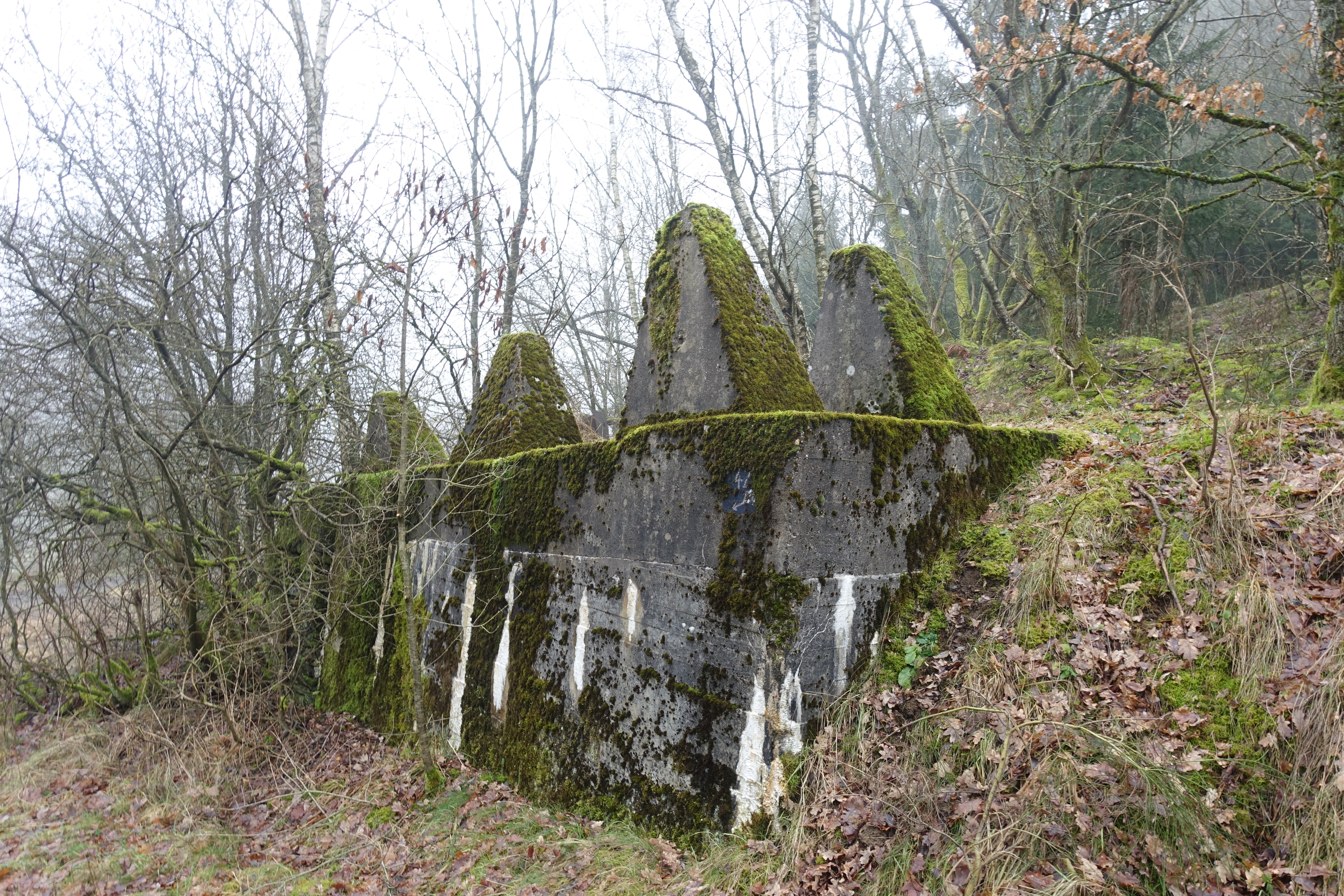 Tankversperring van Westwall (Siegfriedlinie) in Herzfeld (D) bij Lützkamper Mühle